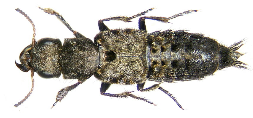 Familie: Staphylinidae Grösse: 10-15 mm Verbreitung: Europa Fundort: Germania, Bayern, Oberfranken, Selbitz leg.det. U.Schmidt, 2000 Foto: U.Schmidt, 2005